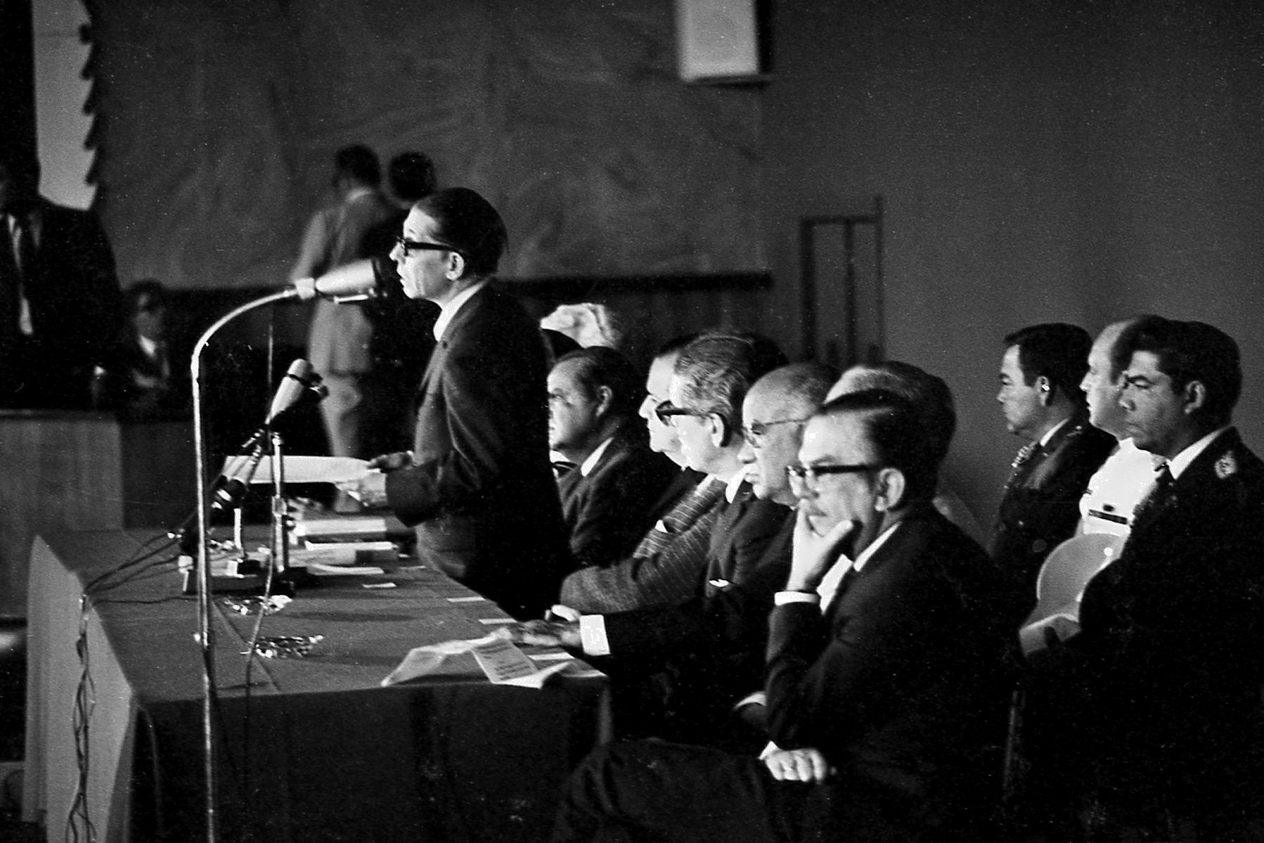 El poeta José Ramón Medina, presidente del III Congreso Latinoamericano de Escritores, durante un discurso en la instalación de este evento. Puerto Azul, Naiguatá, Venezuela.